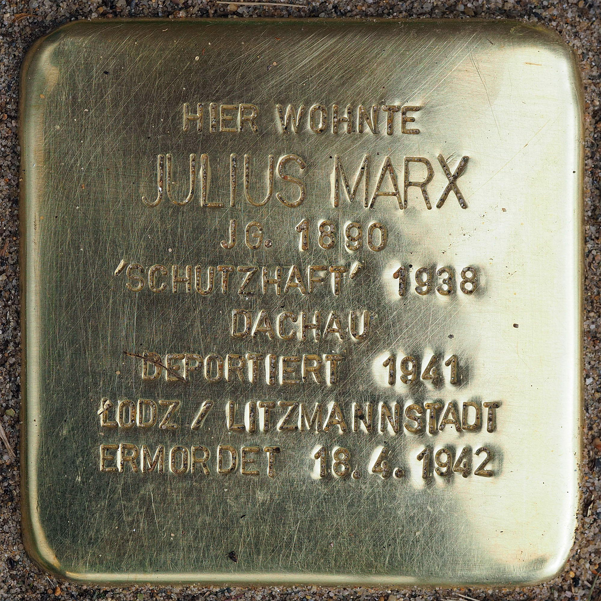 Stolpersteine Suechteln: Marx, Julius